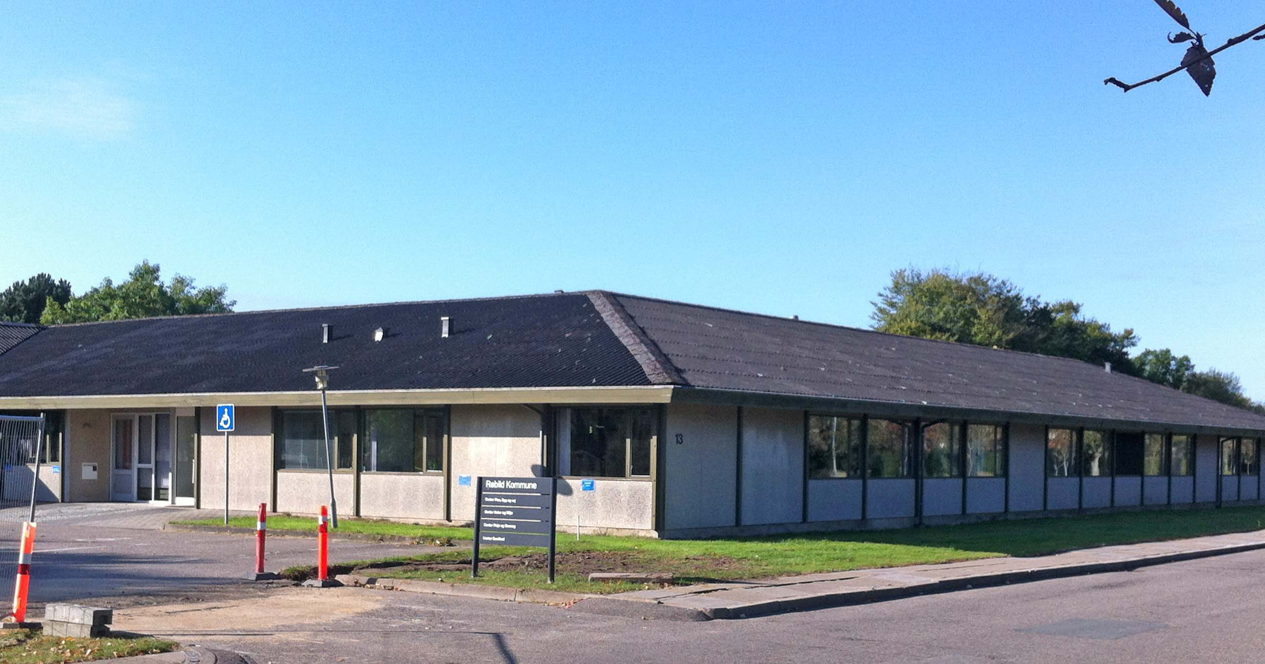 Nørager Kommunes tidligere rådhus, nu en af Rebild Kommunes 3 administrationsbygninger. Tv. et hjørne af indhegningen omkring den grund, hvor Nørager Station er revet ned og Rebild Kommune opfører ny administrationsbygning.